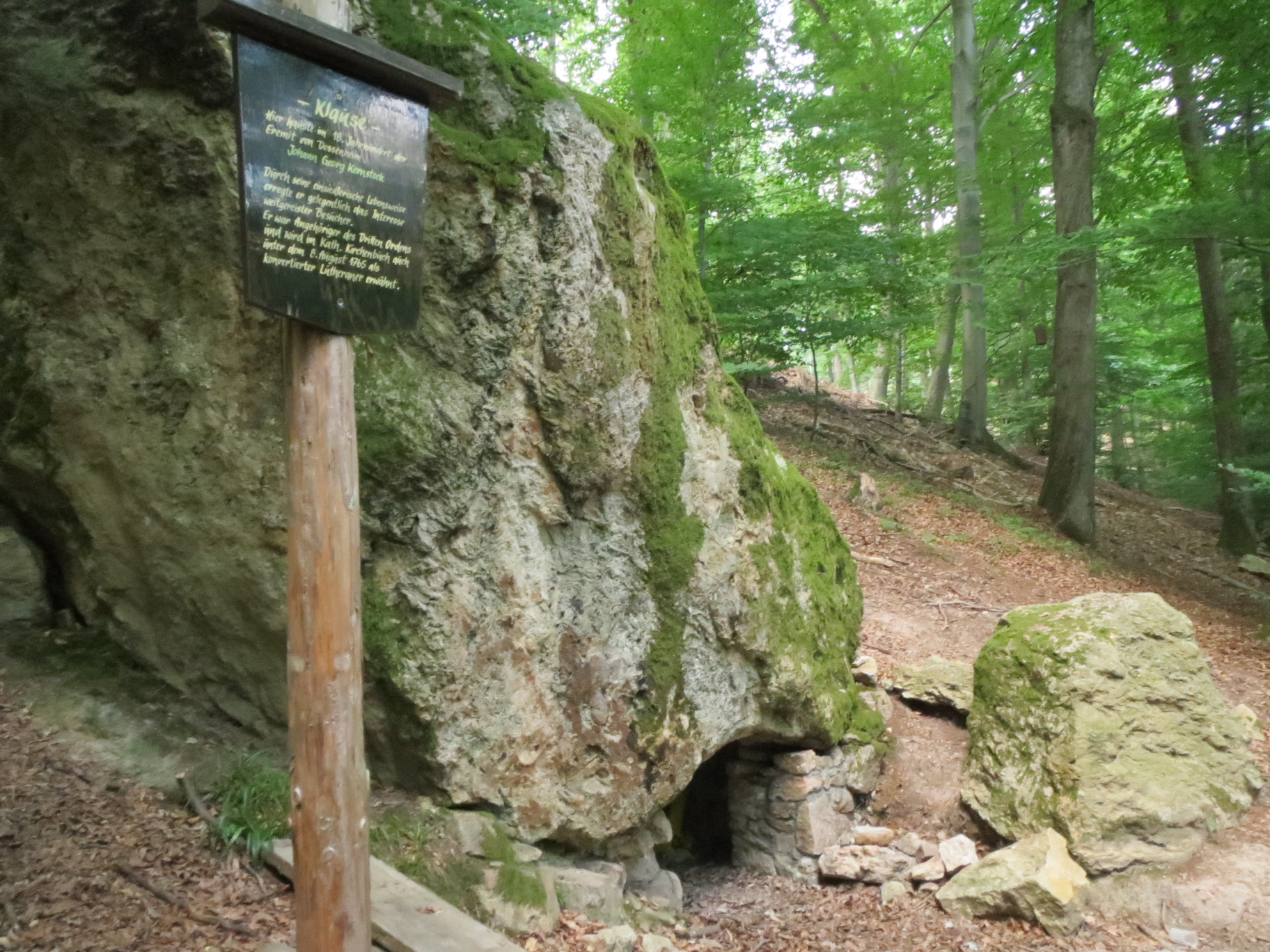 Dossenheimer Klause mit Eingang und Hinweisschild. Blick nach Osten, schräg darauf (vorne).